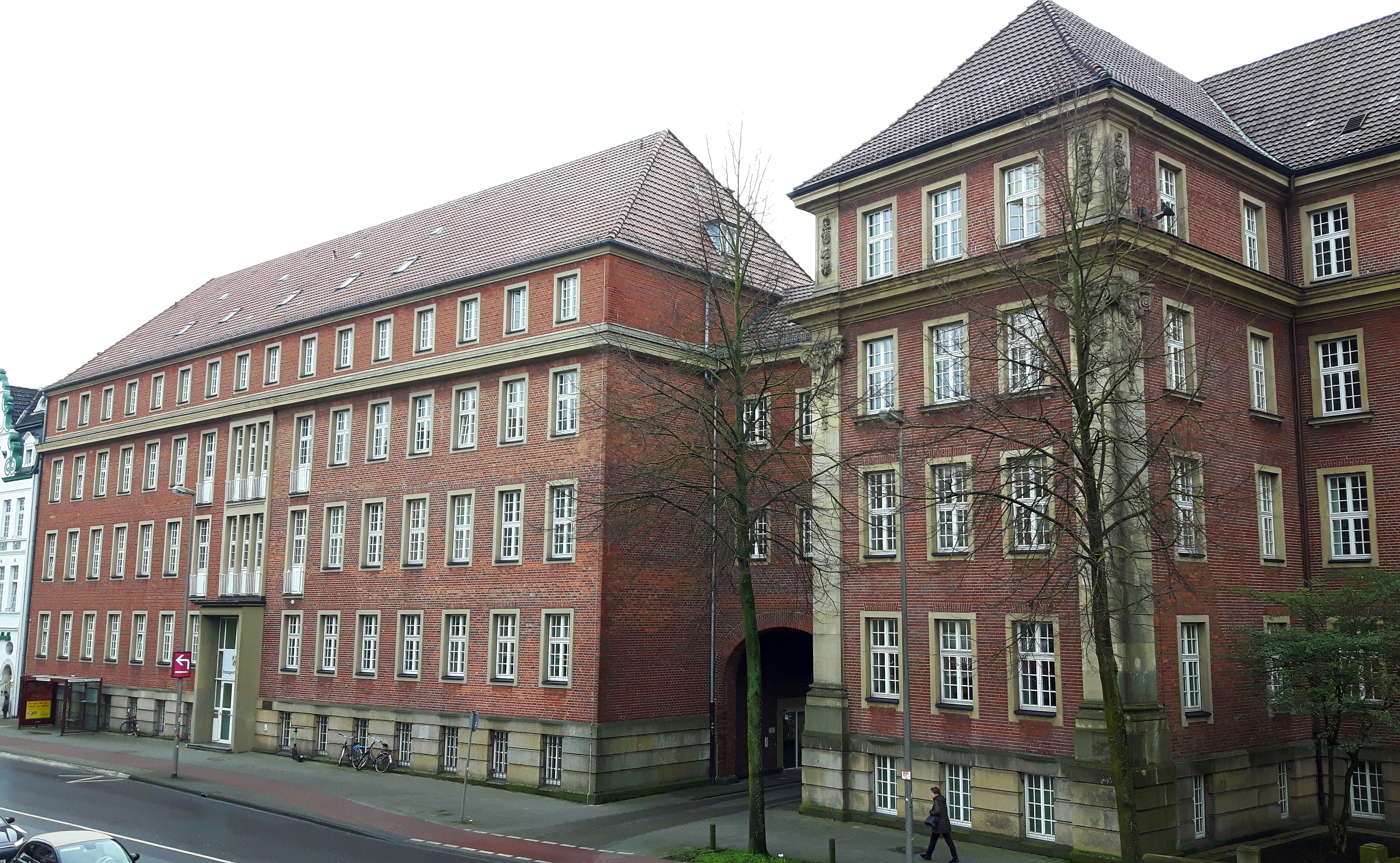 Finanzgericht in Münster, Germany.